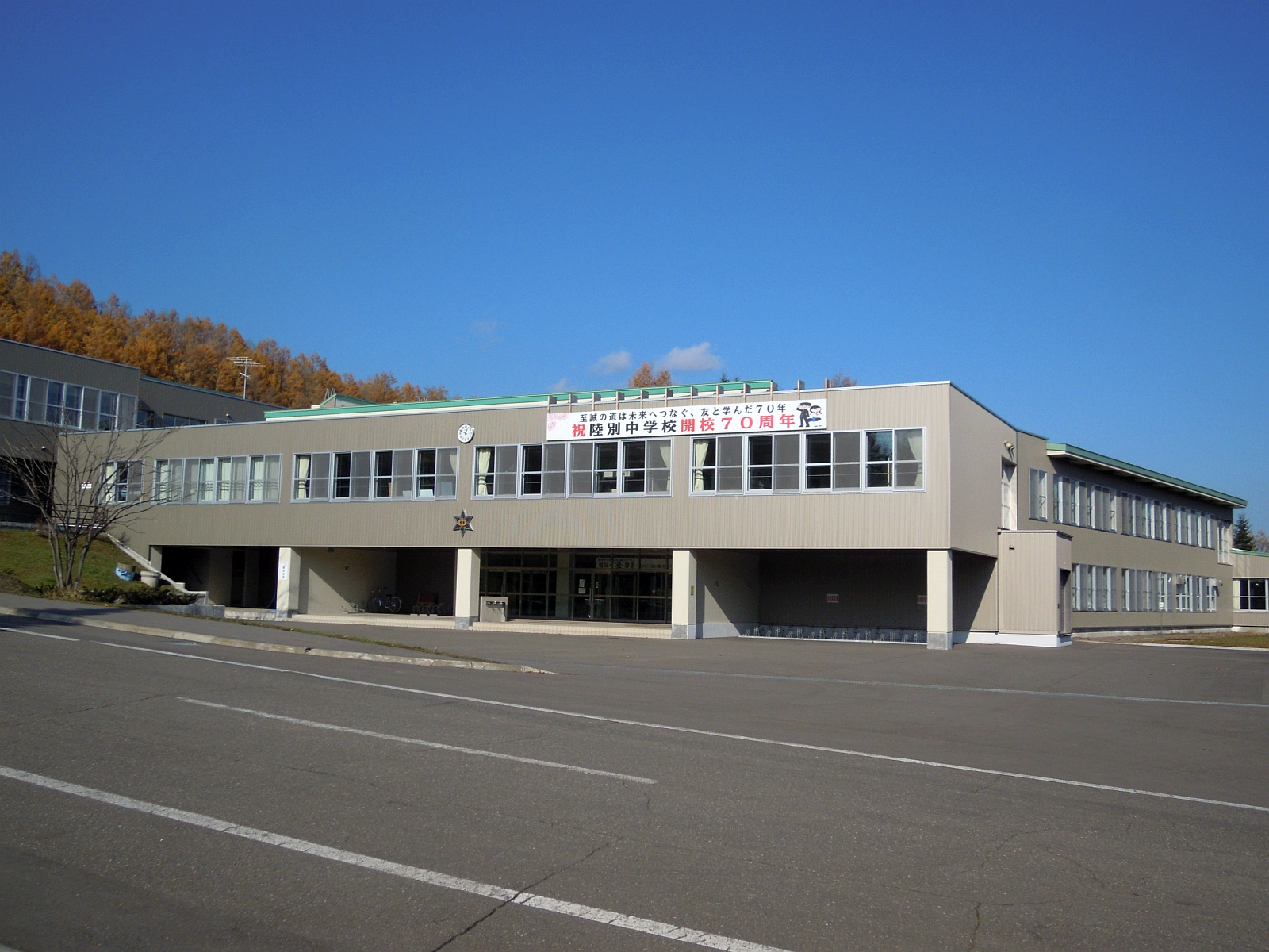 北海道足寄郡陸別町にある陸別中学校校舎